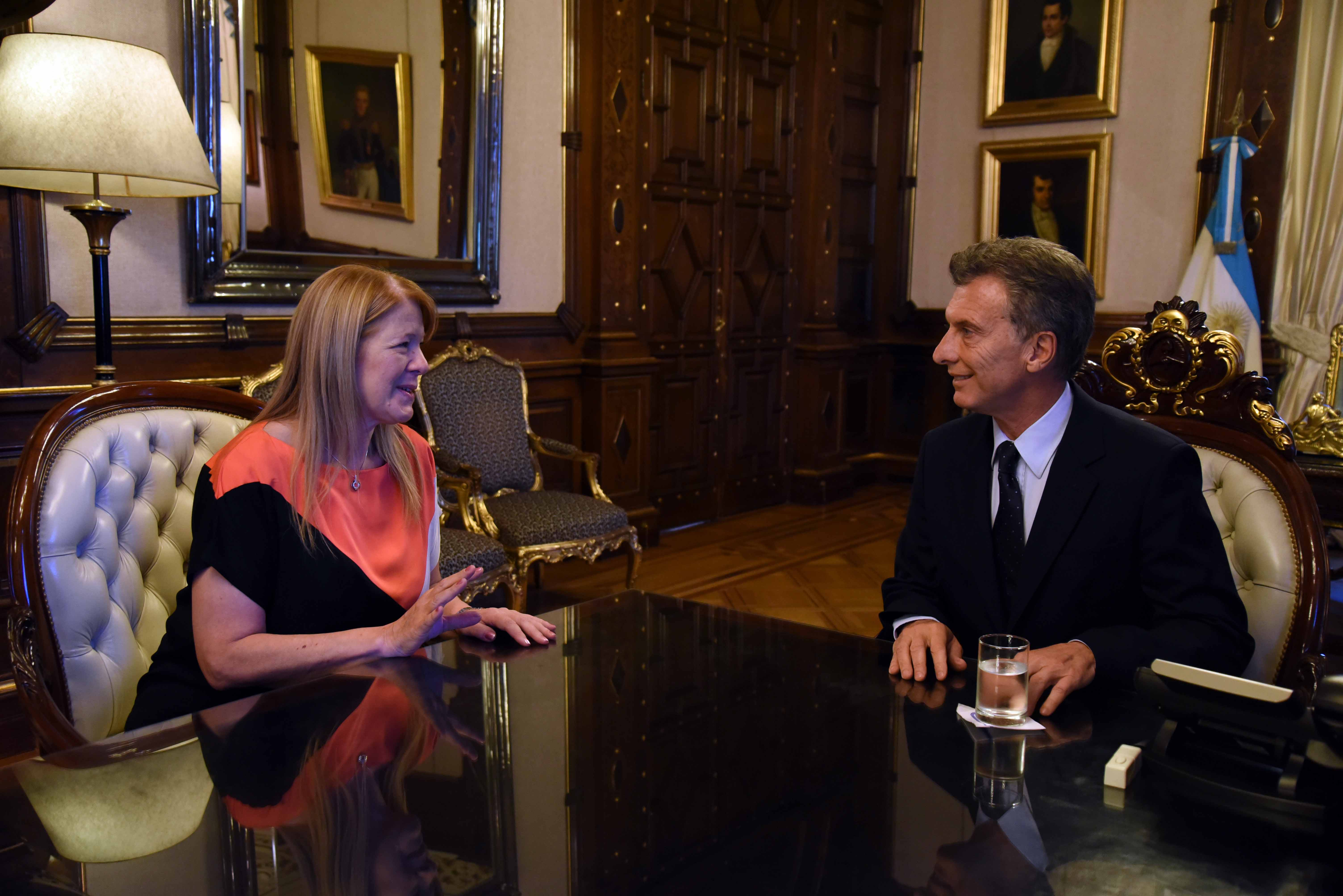 El Presidente de la Nación, Mauricio Macri, recibe en su despacho de Casa de Gobierno a la diputada nacional Margarita Stolbizer en el marco de reuniones con los demás candidatos presidenciales en las elecciones en las cuál fue electo.